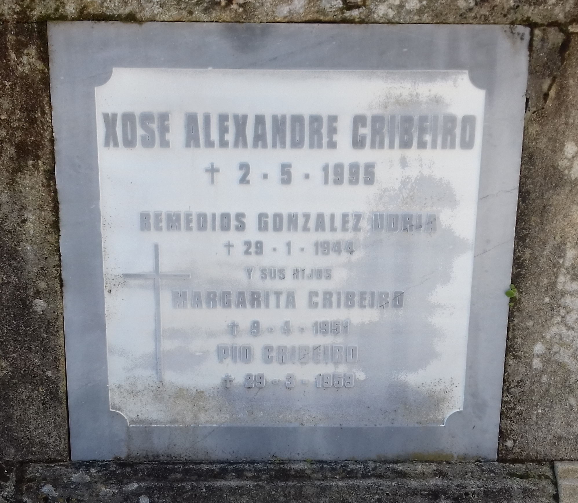 Lápida de Xosé Alexandre Cribeiro, Remedios González Udria, Margarita Cribeiro e Pío Cribeiro